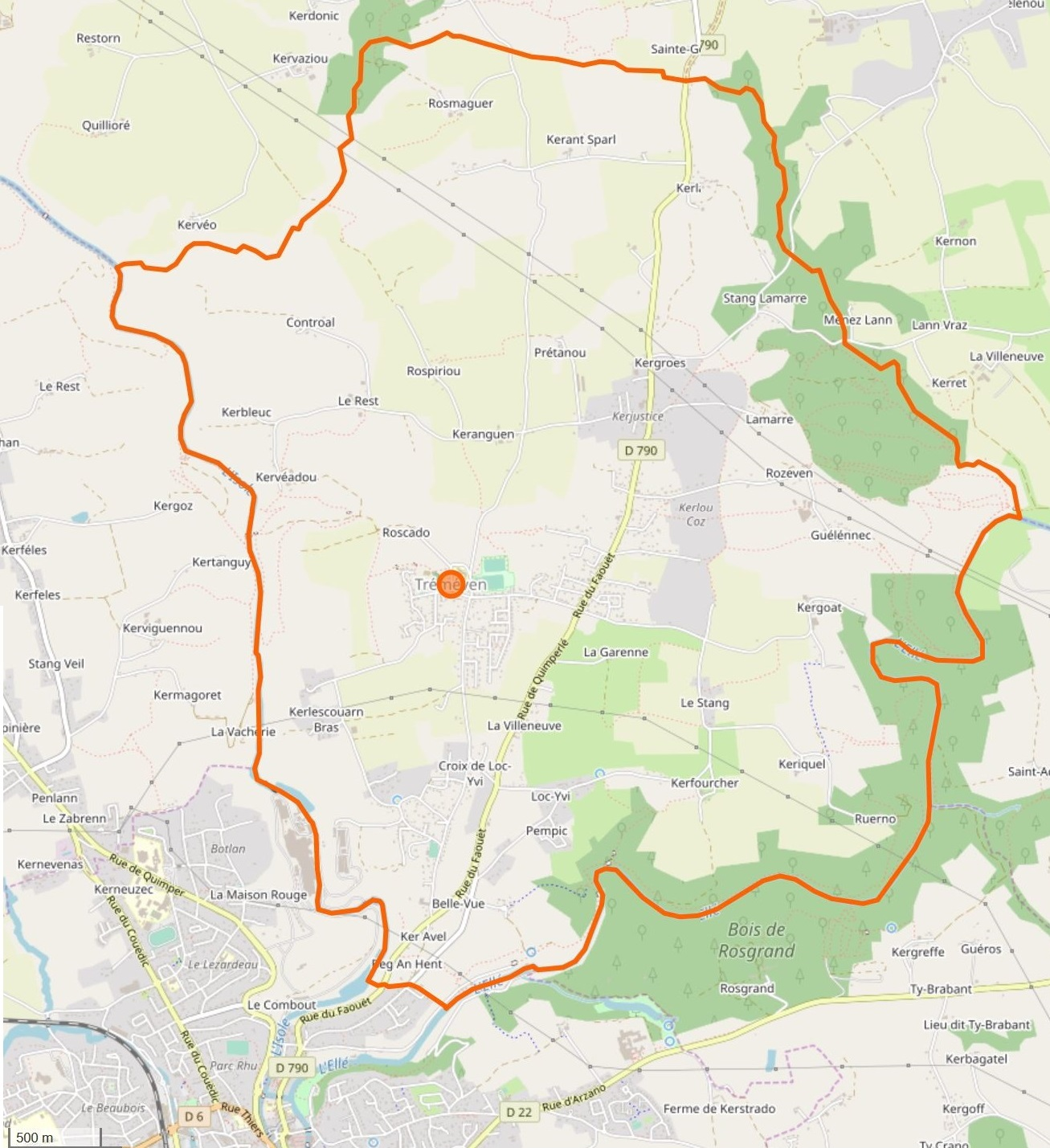 Cette carte a été créée à partir des données du projet Openstreetmap. This map may be incomplete, and may contain errors. Don't rely solely on it for navigation.